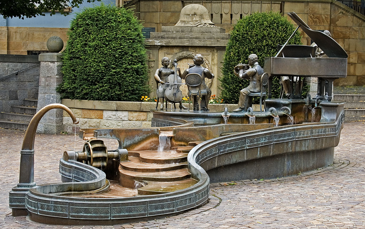 Musikantenbrunnen Donaueschingen